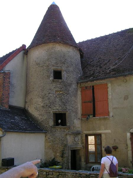 maison ancienne de Chalivoy-Milon (Cher)